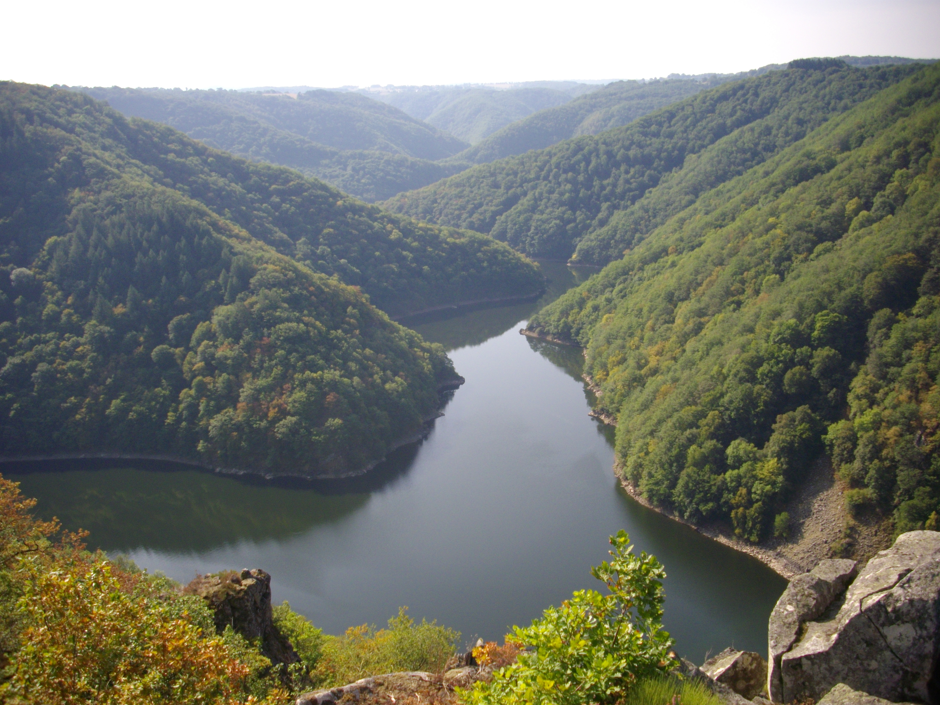 La Sumène (en face) se jette dans la Dordogne (au premier plan, retenue du barrage de l'Aigle) vue depuis le belvédère de Gratte-Bruyère, sur la commune de Sérandon, en Corrèze ; au second plan, communes du Cantal : Veyrières à gauche de la Sumène et Arches à droite.